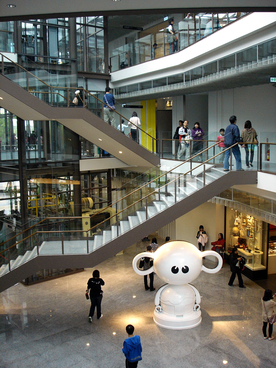 中文（台灣）: 巧克力共和國內部